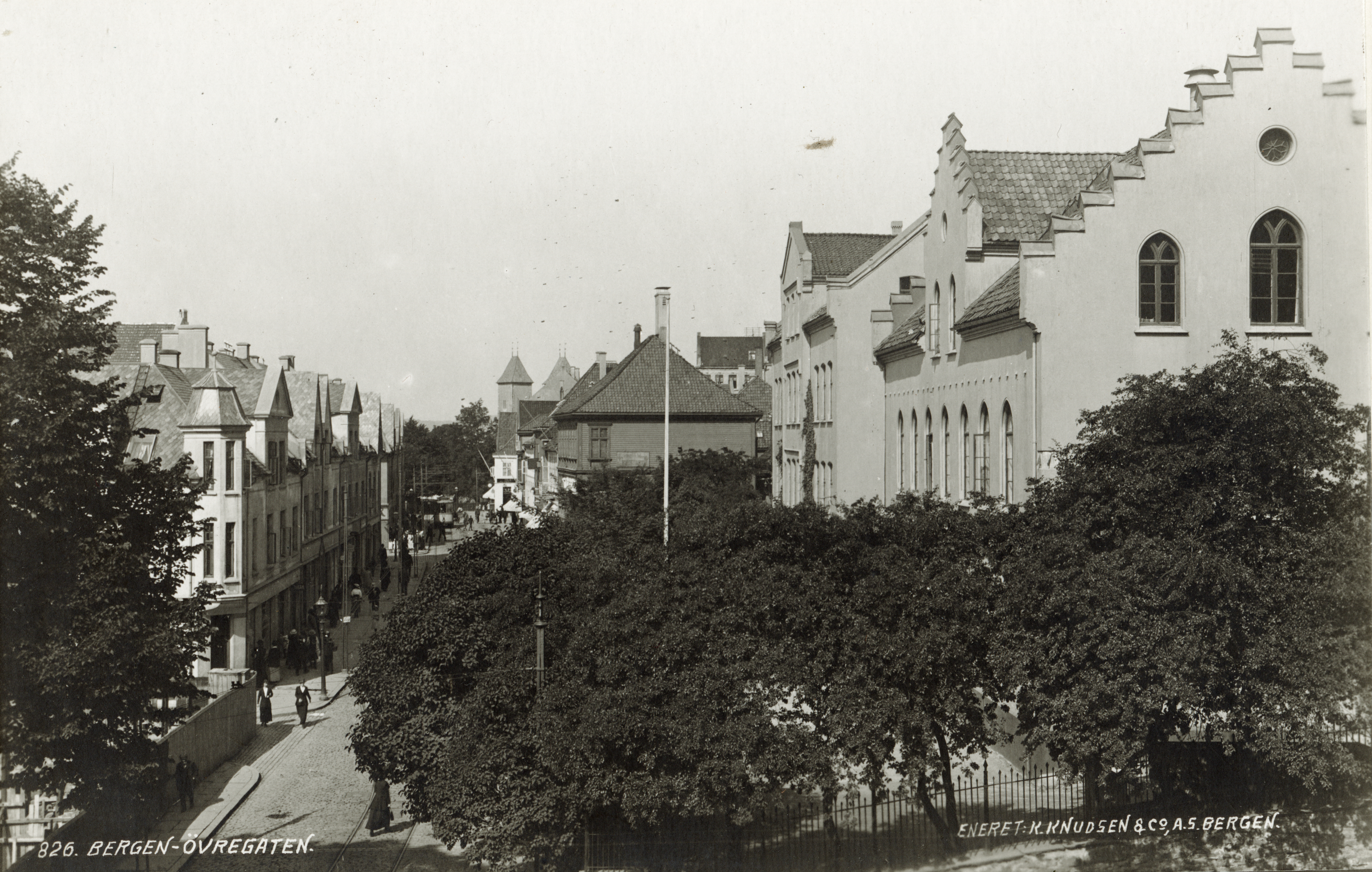 Øvregate, Hordaland 826. Øvregaten, Eneret K. Knudsen & Co. A/S, Bergen